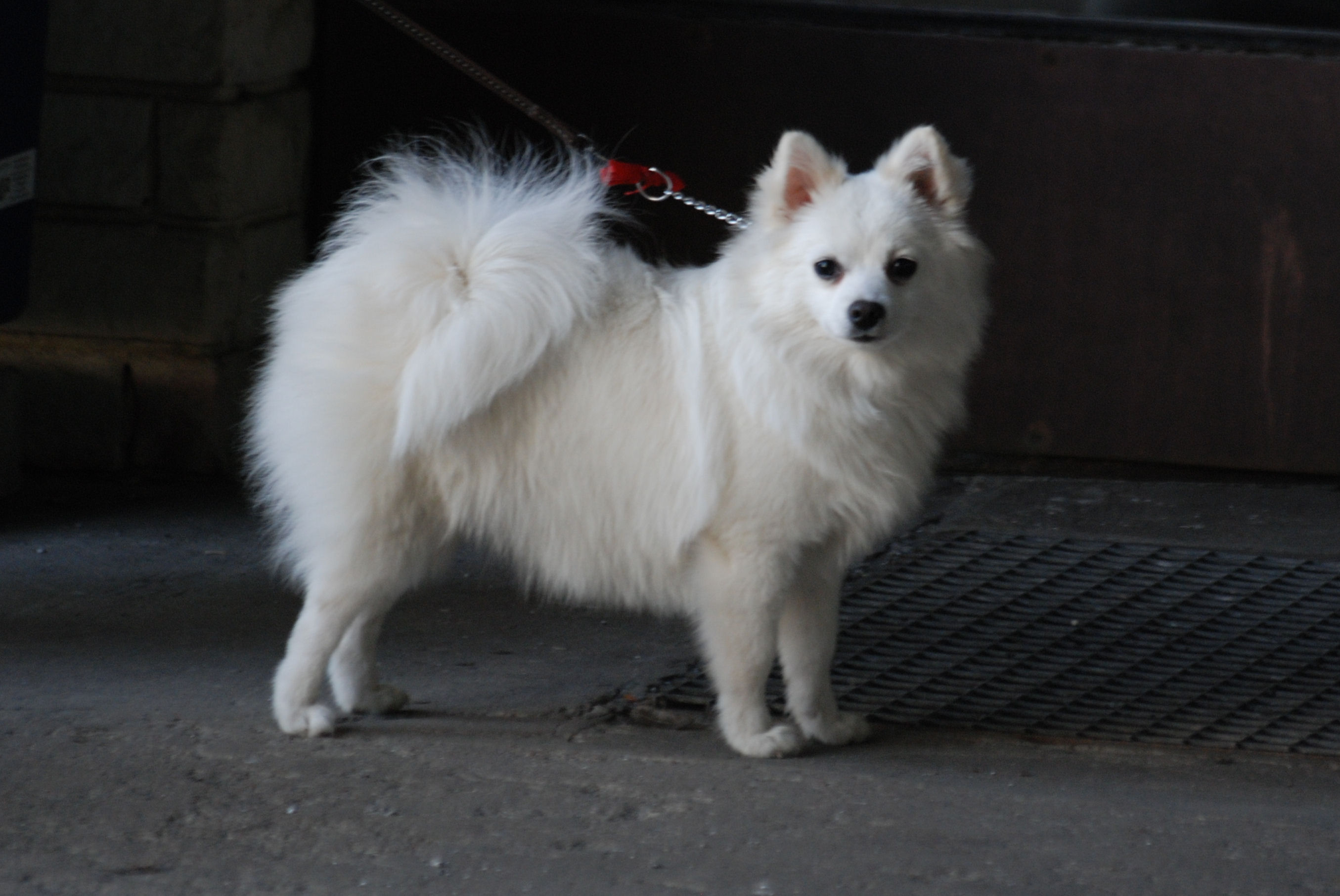 Volpino Międzynarodowa Wystawa Psów Rasowych w Katowicach 28 - 30. 03.2008